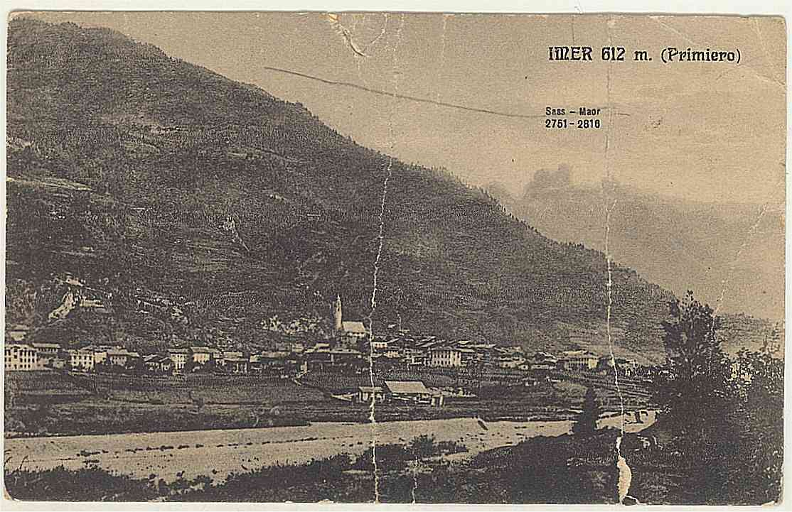 TN Imer m. 612 - valle del Primiero - Sass 2751 Maor 1816